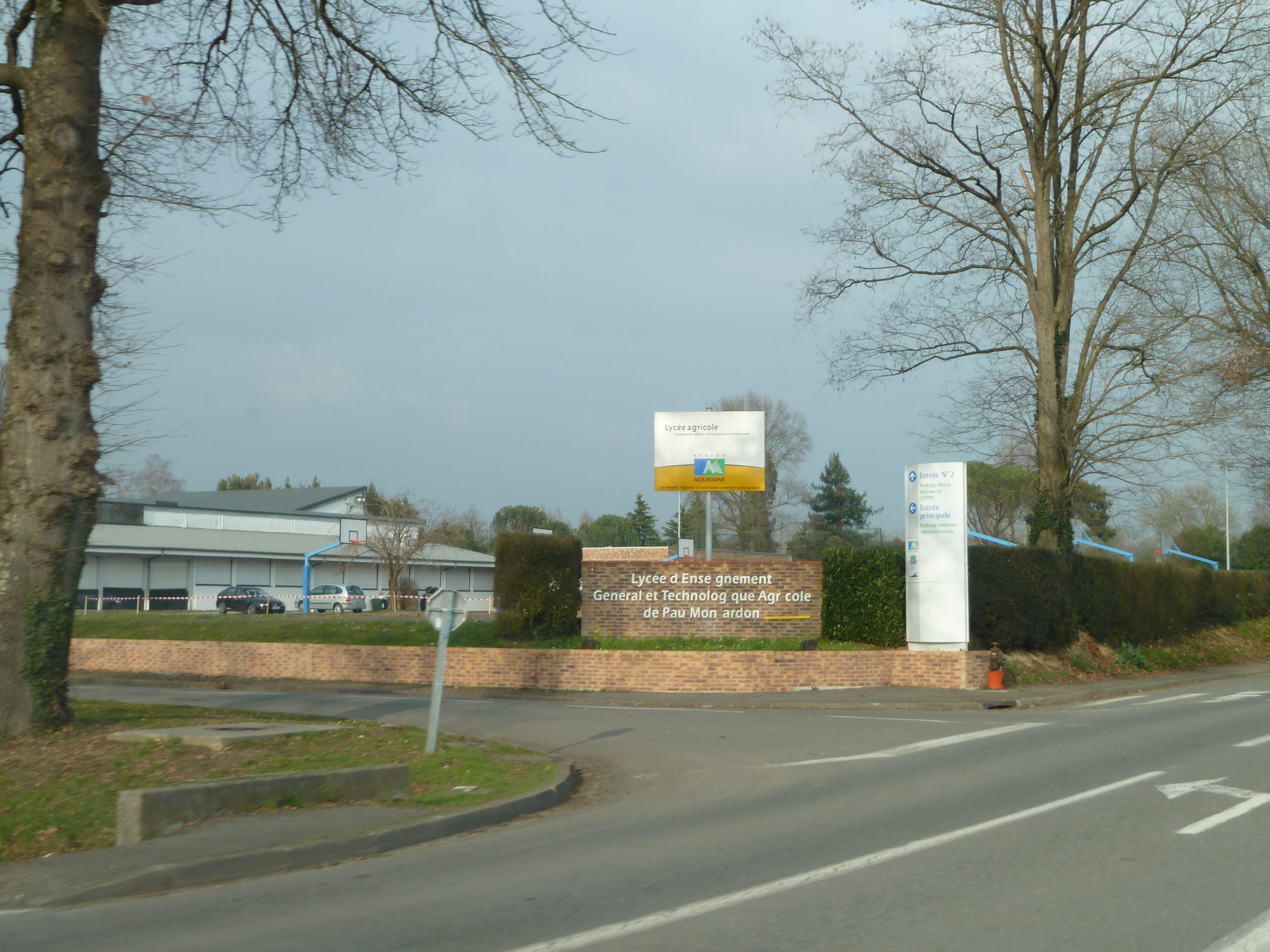 Lycée agricole de Montardon, entrée principale